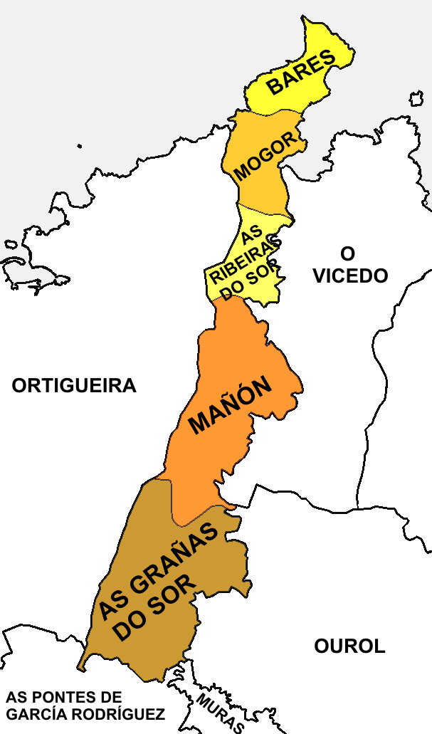 Parroquias do concello de Mañón (Provincia da Coruña)